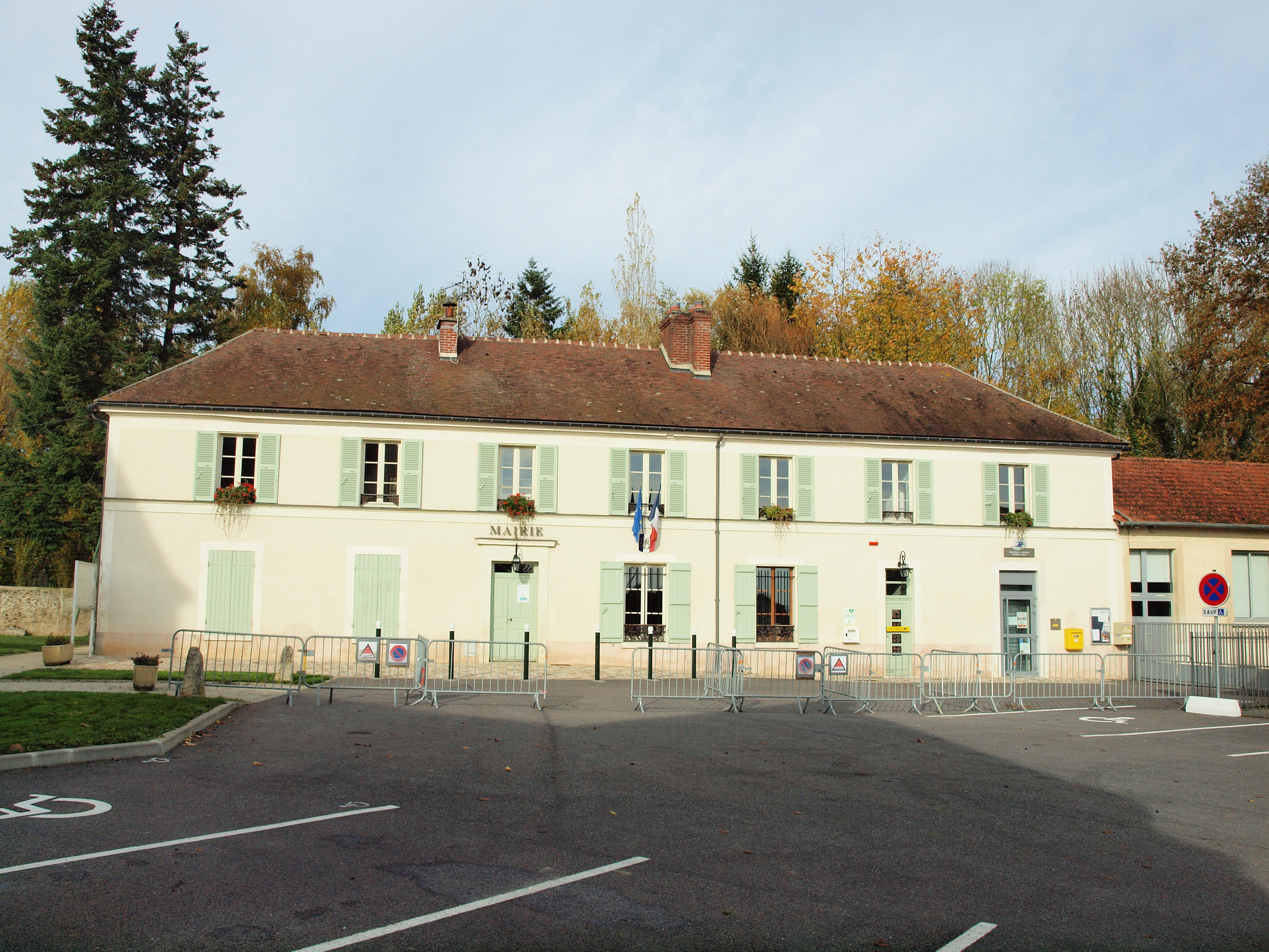 Pierre-Levée (Seine-et-Marne, France)